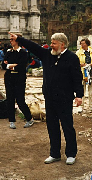 Gunnar Danbolt